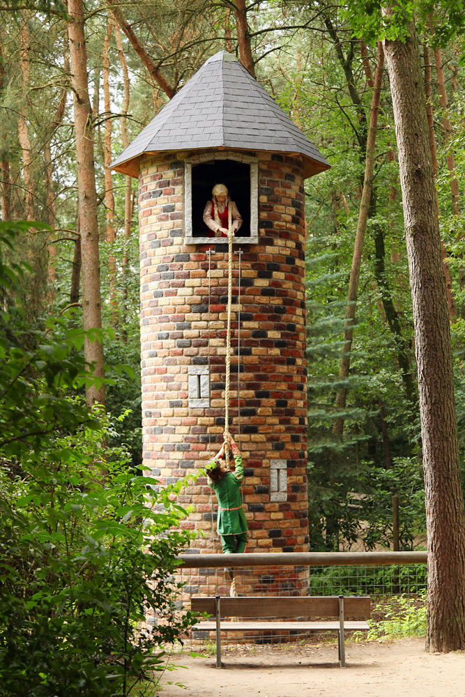 Darstellung des Märchens Rapunzel im Märchenwald des Wild- und Freizeitparks Ostrittrum